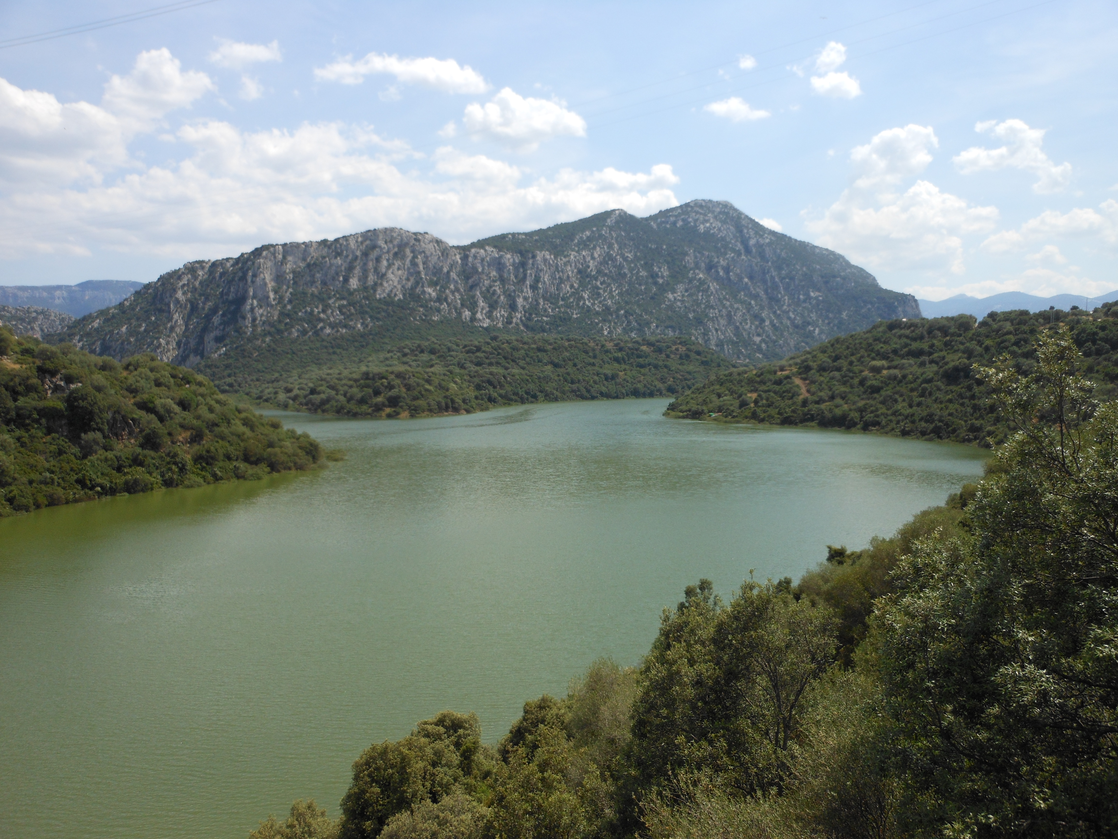 Dorgali - Lago Cedrino